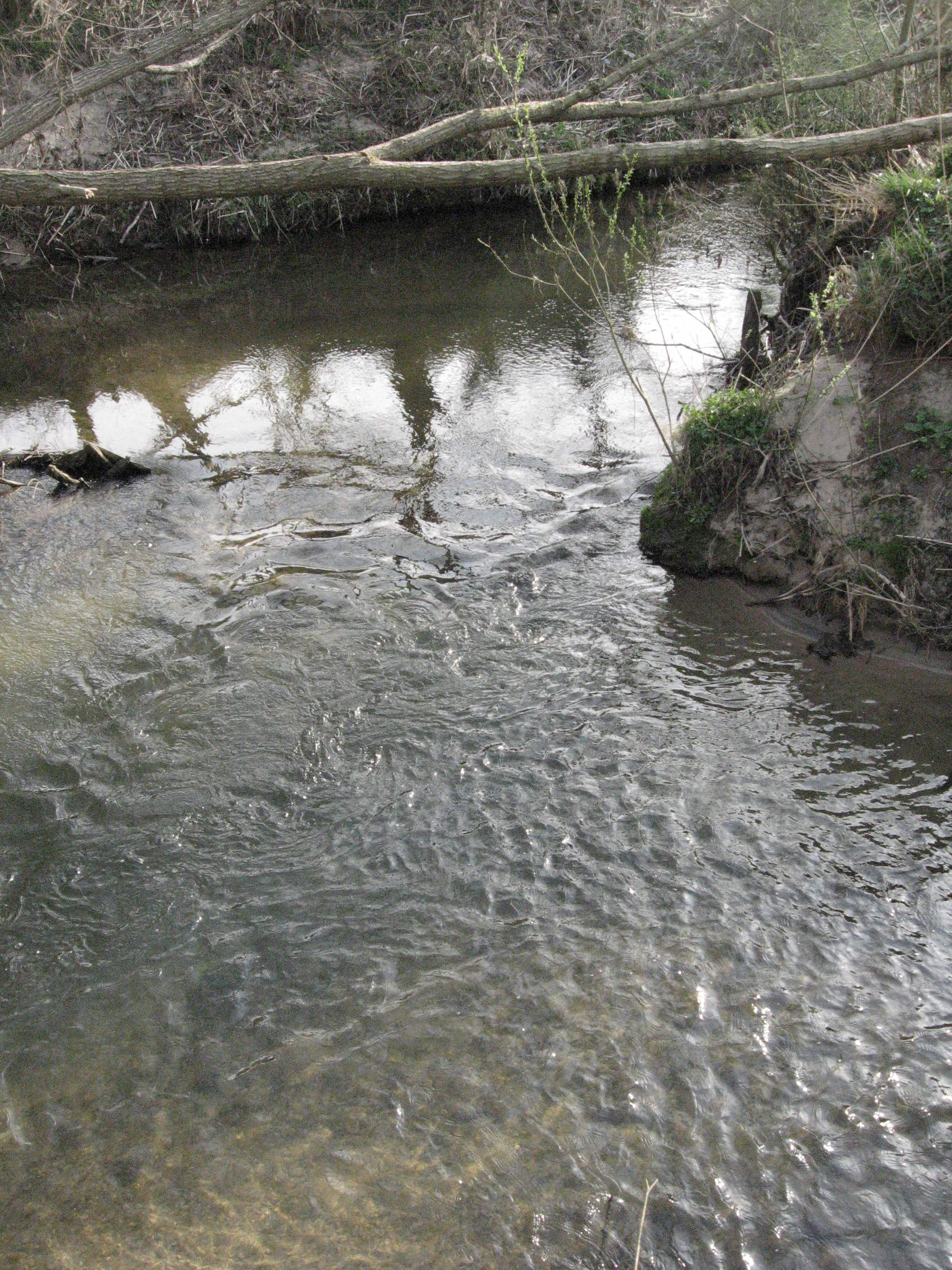 Mündung der Fischach (von rechts unten) in die Bühler (von rechts oben) bei Bühlertann-Kottspiel.